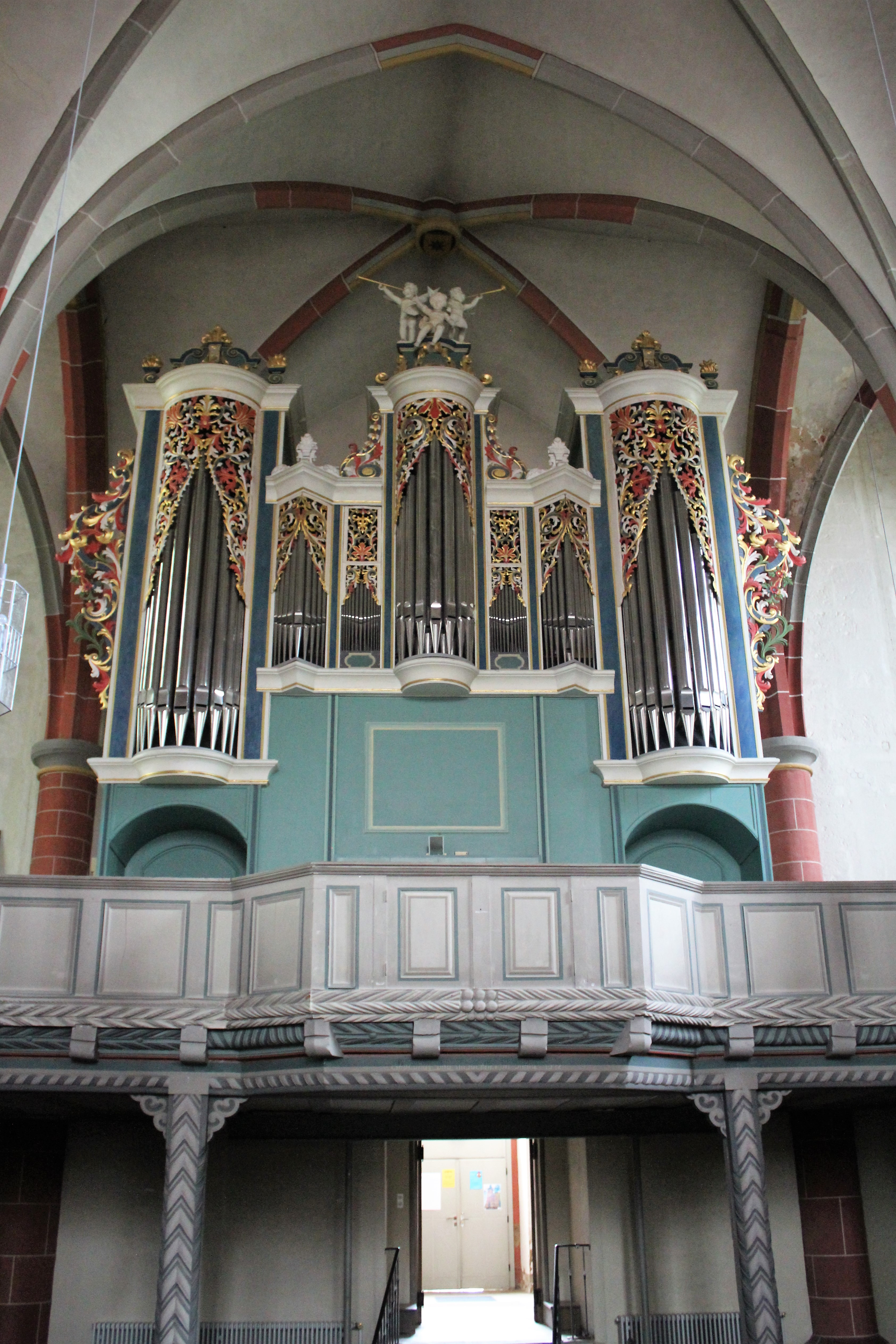 St. Nikolai Korbach, Landkreis Waldeck-Frankenberg, Hessen, Deutschland